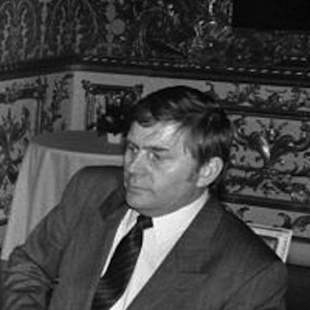 Alfred Gomolka (1940-), ministre-président du Land de Mecklembourg Poméranie occidentale (1990-1992) le 20 décembre 1990 à Munich.